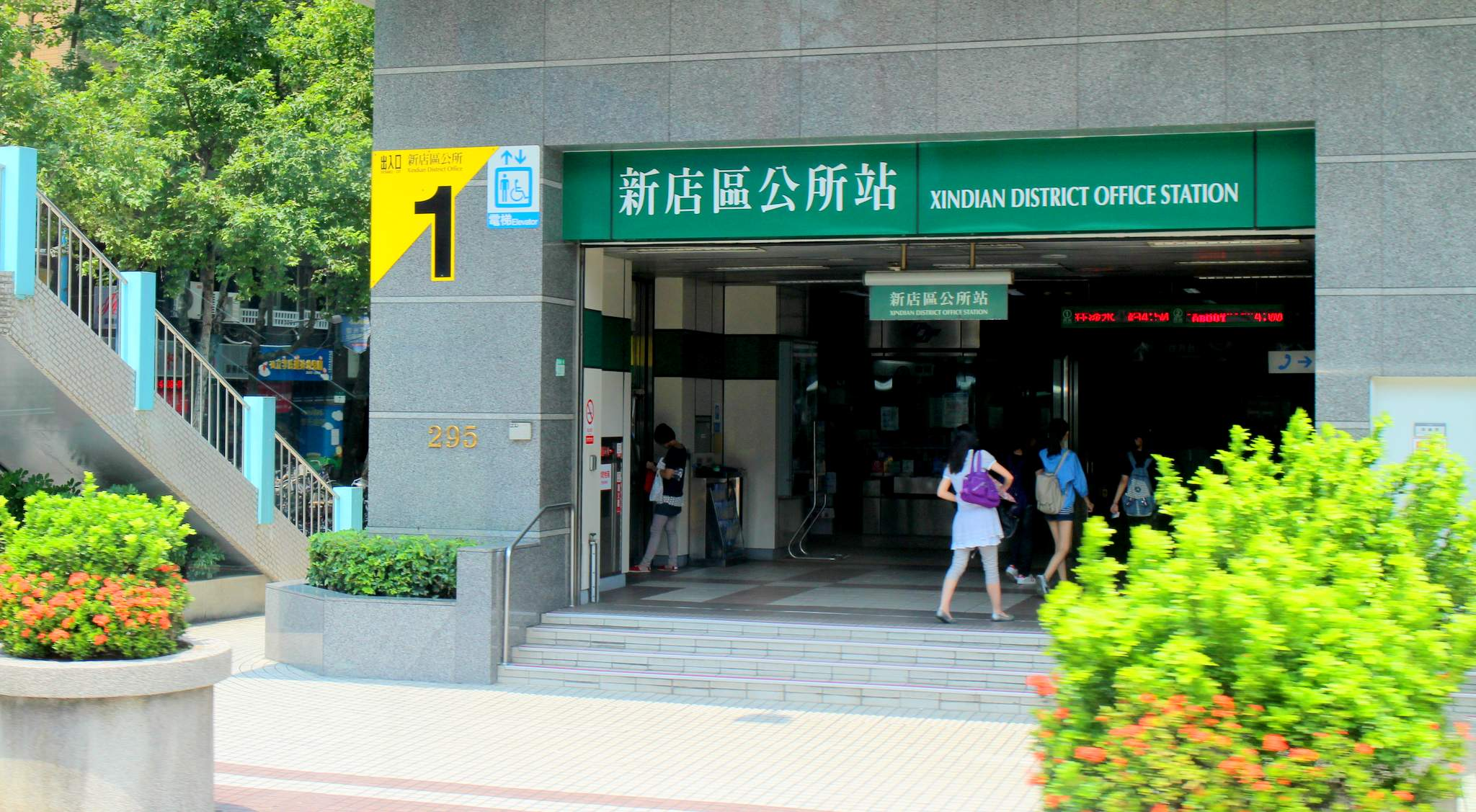 中文（台灣）: 新店區公所站一號出口